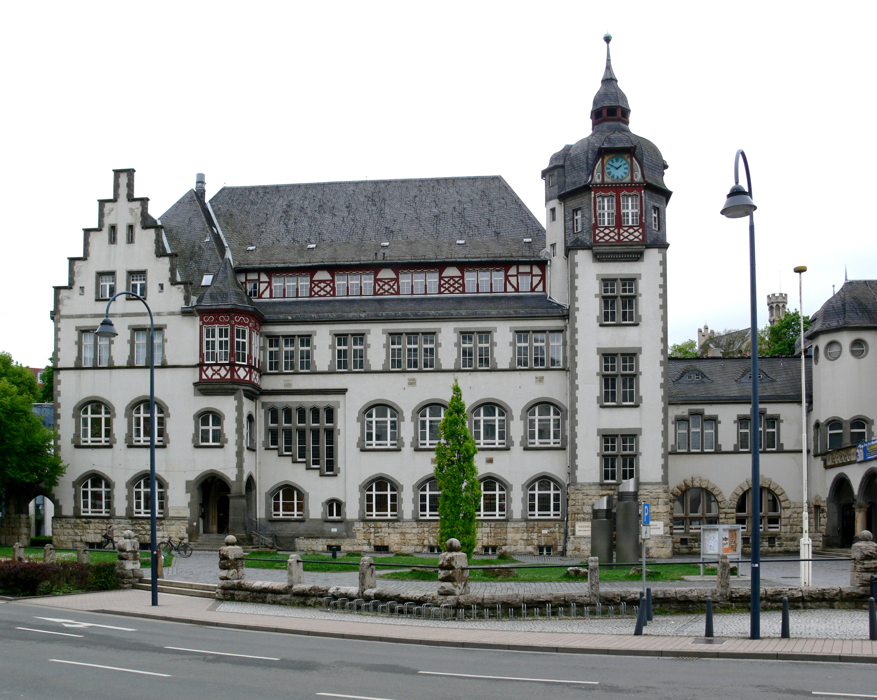 Jena: Volkshaus Jena